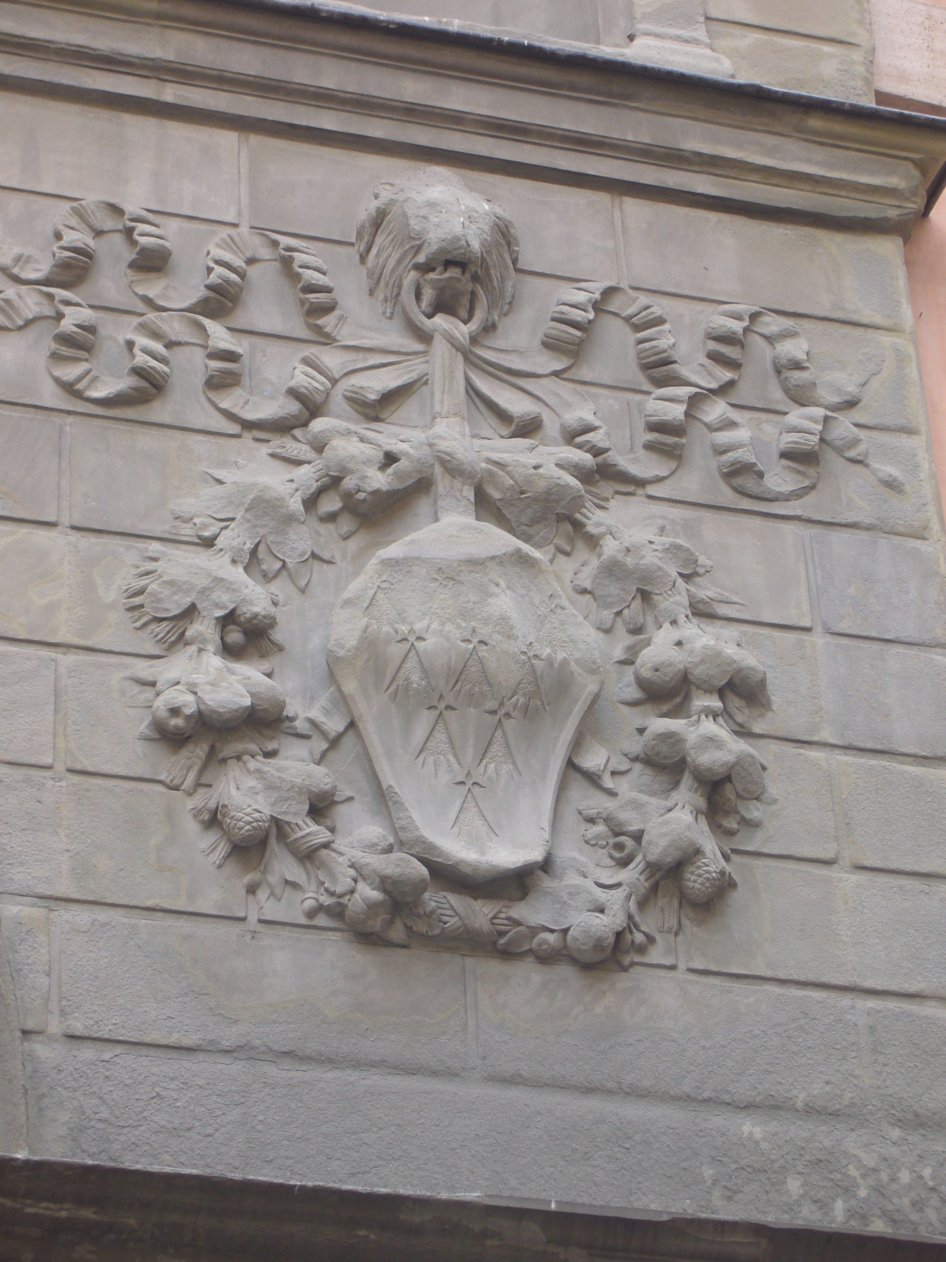 détail de la façade Saint Yves des Bretons à Rome : relief aux armes de la Bretagne